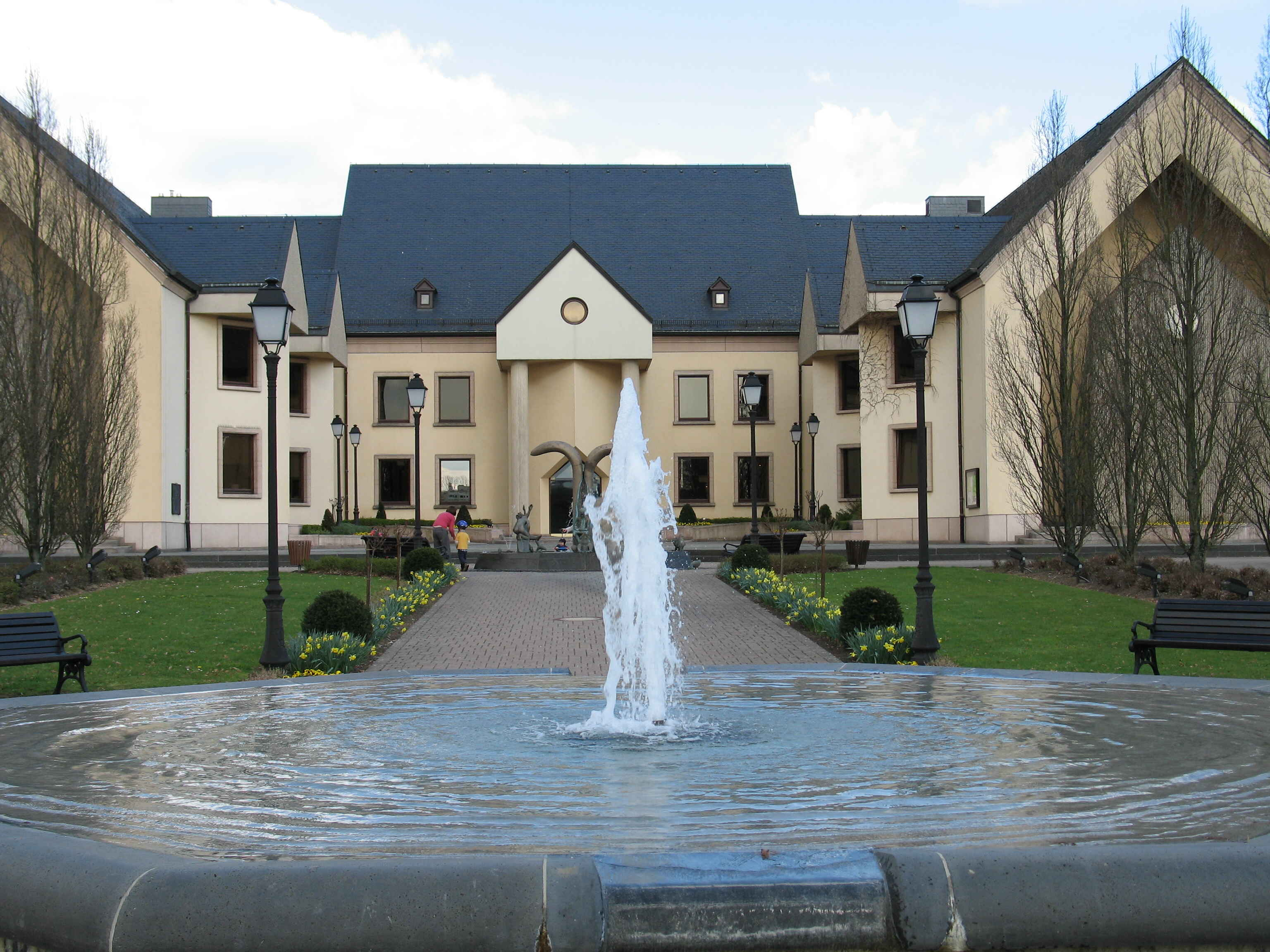 Gemeindehaus Hesperingen